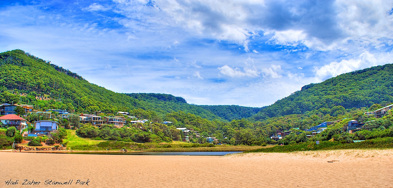 Stanwell Park Beach